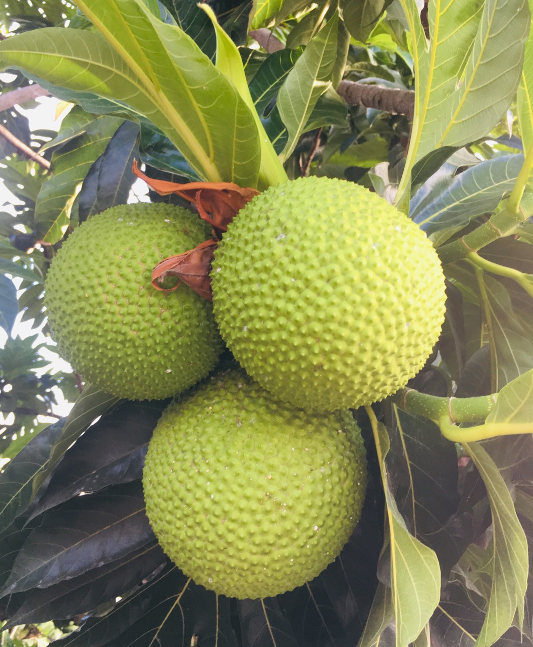 fruit de l'arbre à pain ou uru